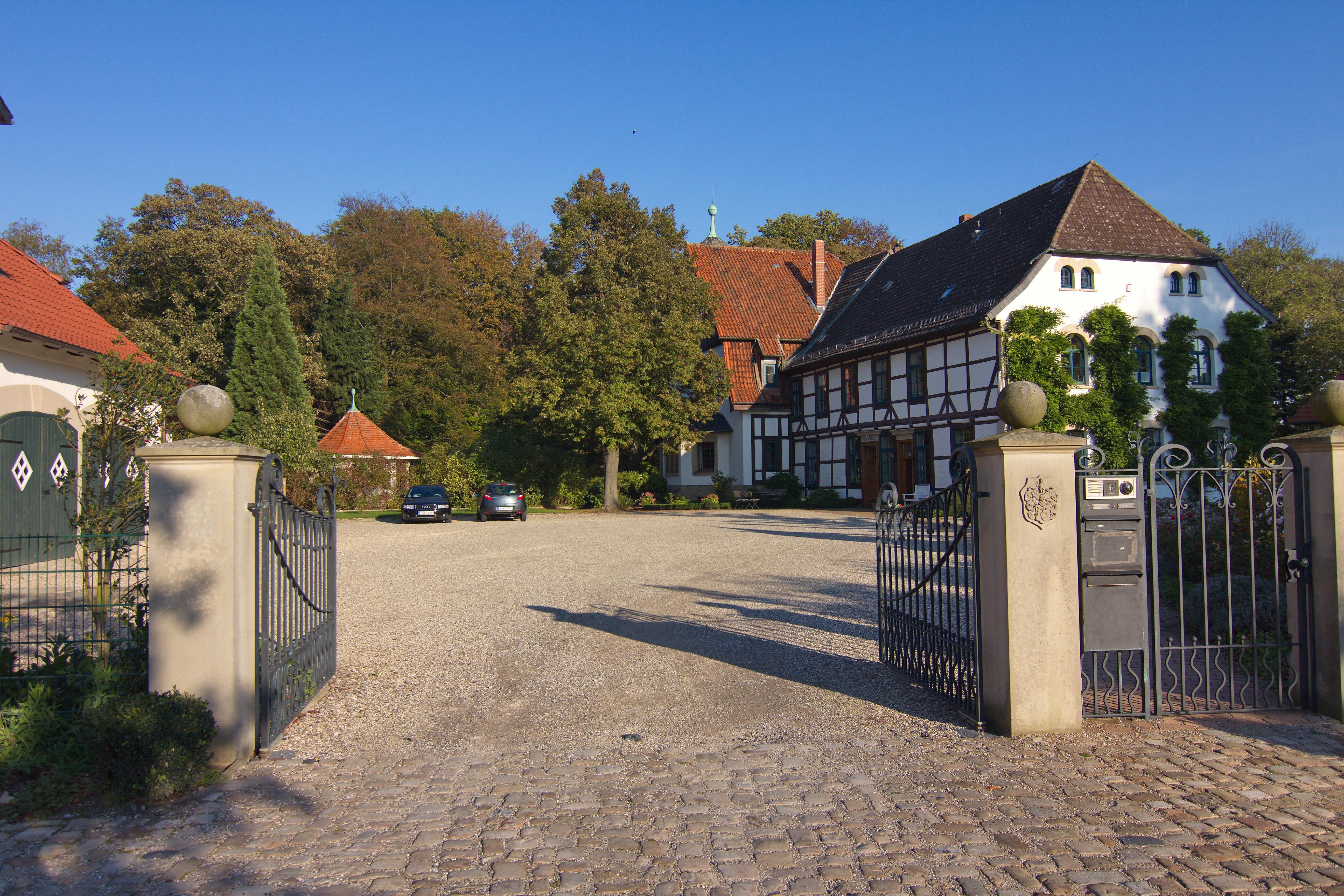 Baudenkmal Gutsanlage, Mauereinfriedung und Parkanlage mit Gartenpavillon an der Brabeckstr. 169 in Bemerode (Hannover), Niedersachsen, Deutschland